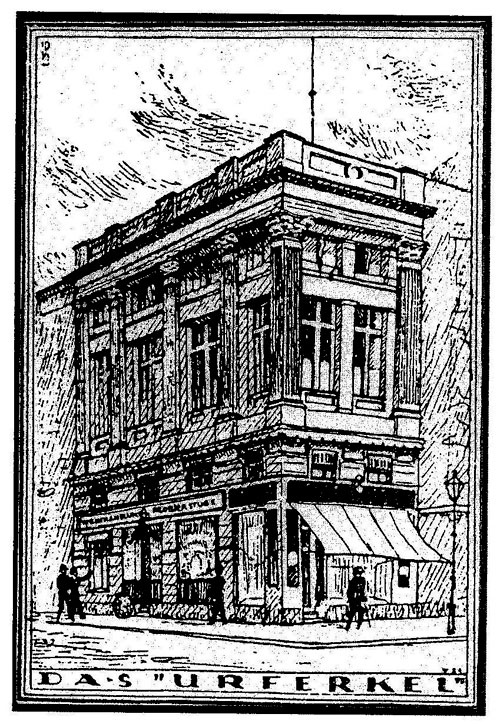 Restaurace "Zum schwarzen Ferkel", Berín, Dorotheenstraße 31. Dobový inzerát.